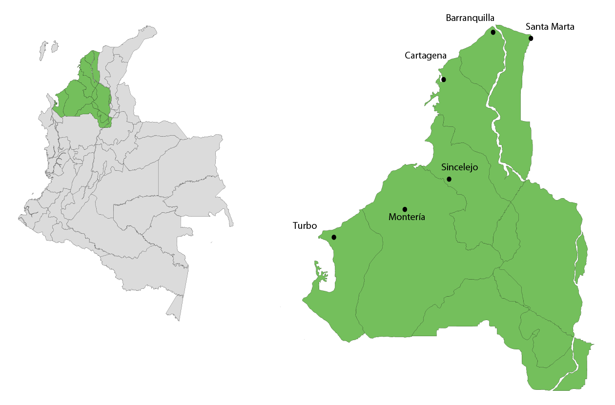 Mapa Eje musical Caribe Occidental